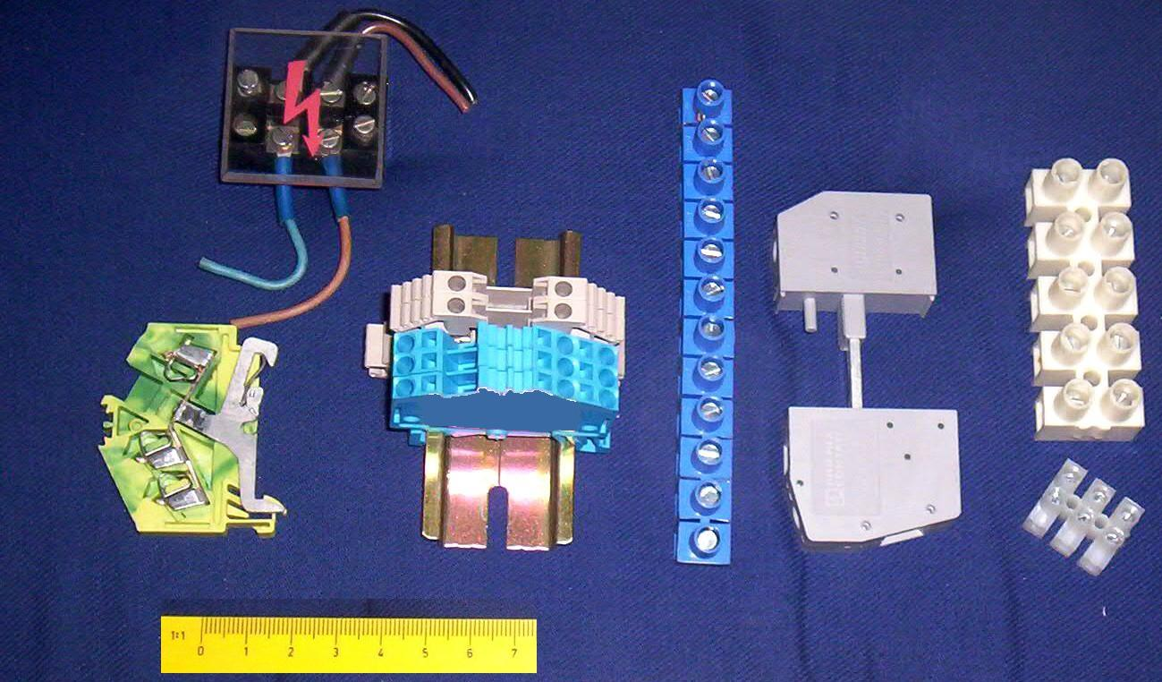 Verschiedene Klemmen, v.l.n.r.: PE-Klemme, Schraubklemme, Reihenklemme, Klemmsteine, Durchführungsklemme, Buchsenklemmen (Lüsterklemme)